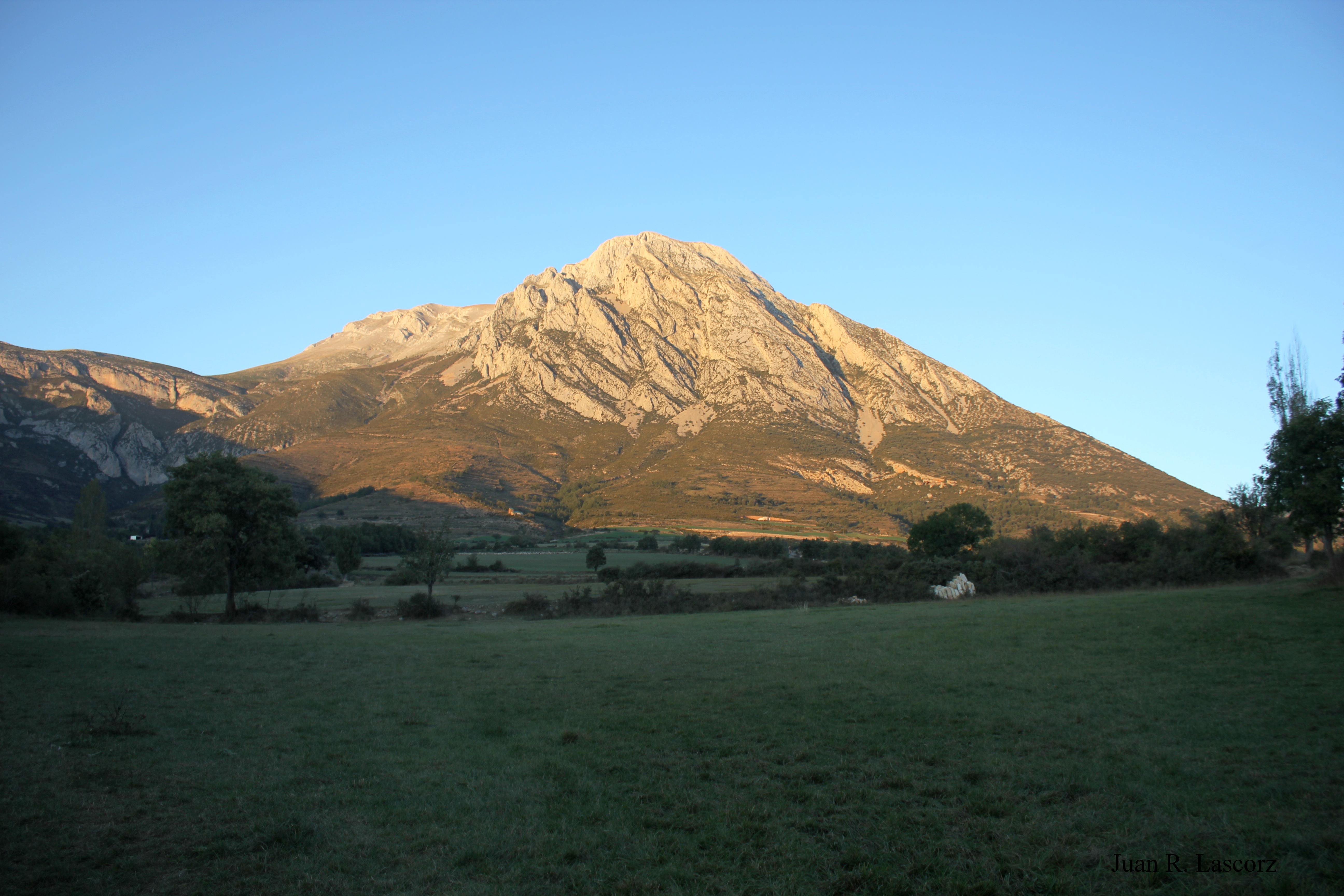 Aragonés: El Turbón tal como se vei dende Eixea, vall de Lierp, Ribagorza.